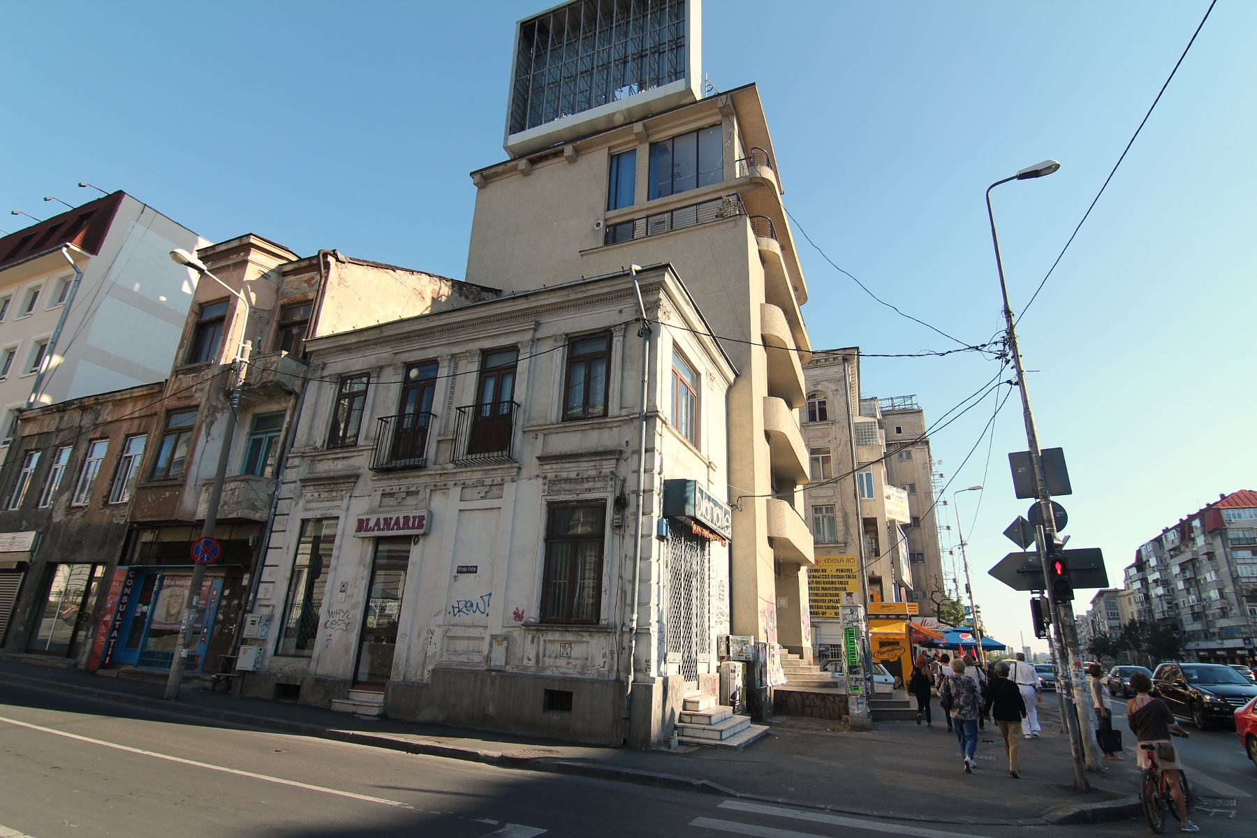 Imobil pe str. Coltei